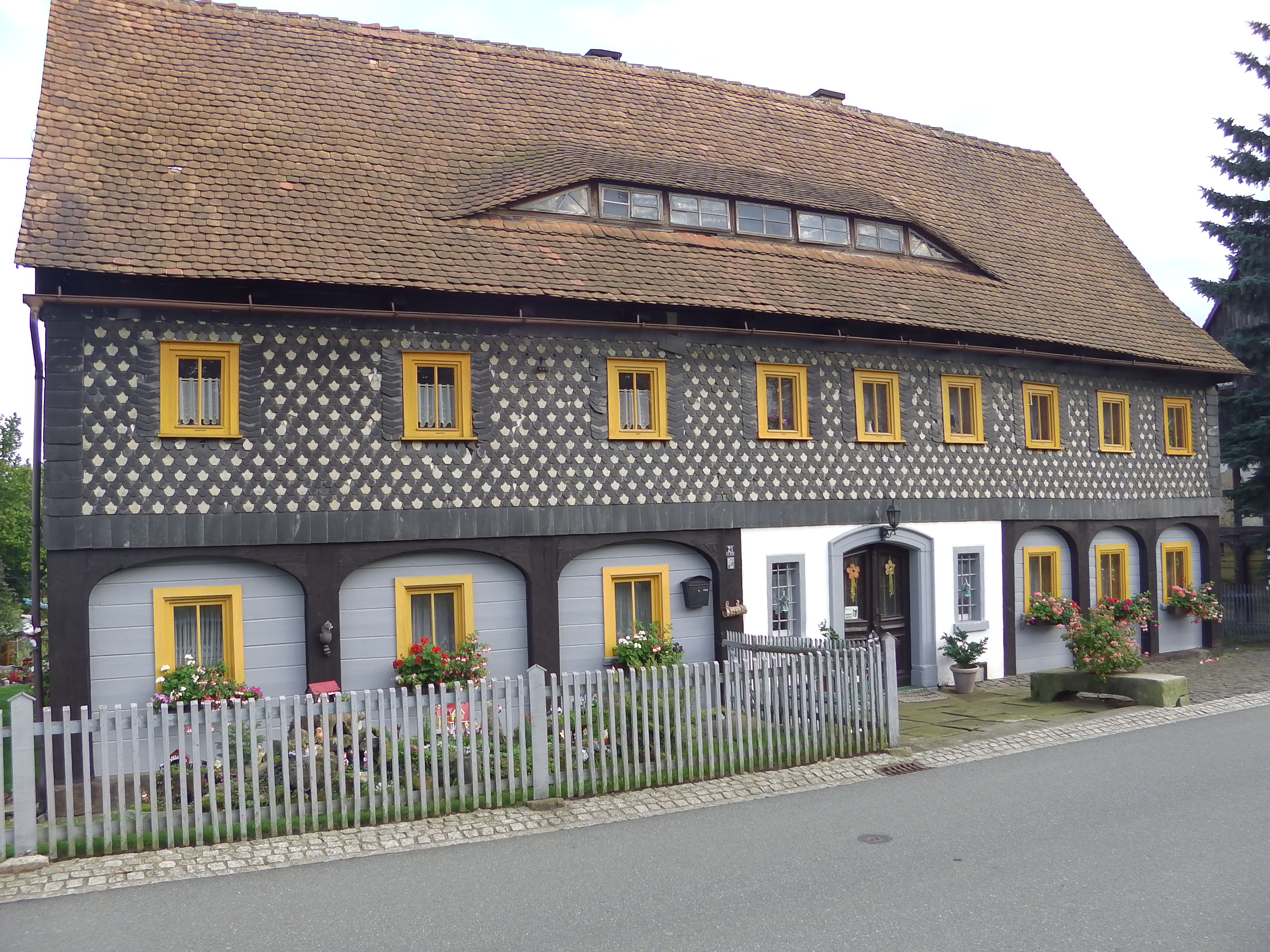 Umgebindehaus in der Neuschönauer Straße 21 in Neuschönau in der Gemeinde Großschönau